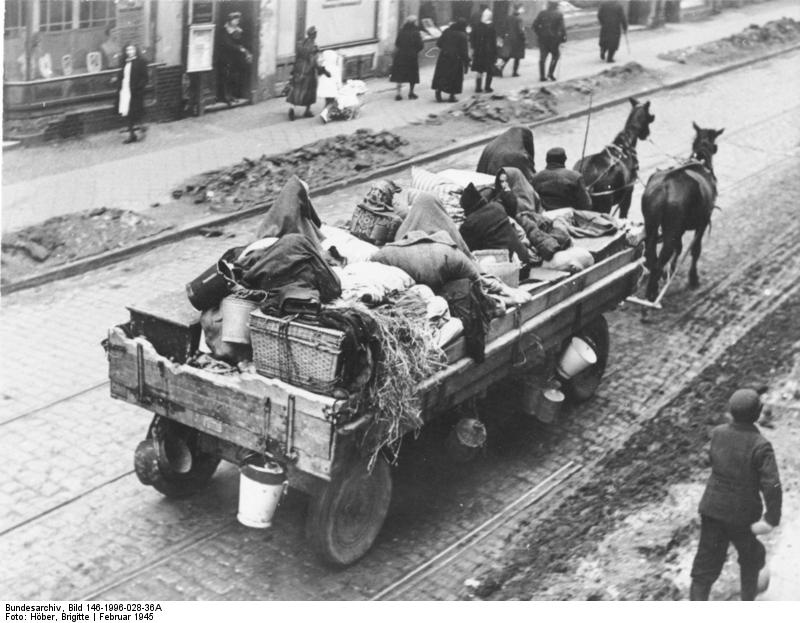 II. Weltkrieg 1939-45 Deutsche Zivilisten im Februar 1945 in Danzig und Umgebung; auf der Flucht vor der herannahenden Roten Armee haben Sie ihre Heimat verlassen. [20.-21. Februar 1945]